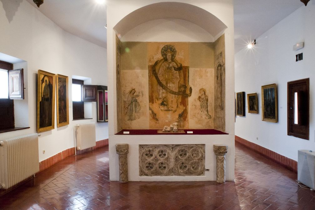 Sala del Museo de Valladolid de la Sección de Bellas Artes que expone la pintura mural de la "Virgen de la Expectación" del Convento de San Pablo de Peñafiel